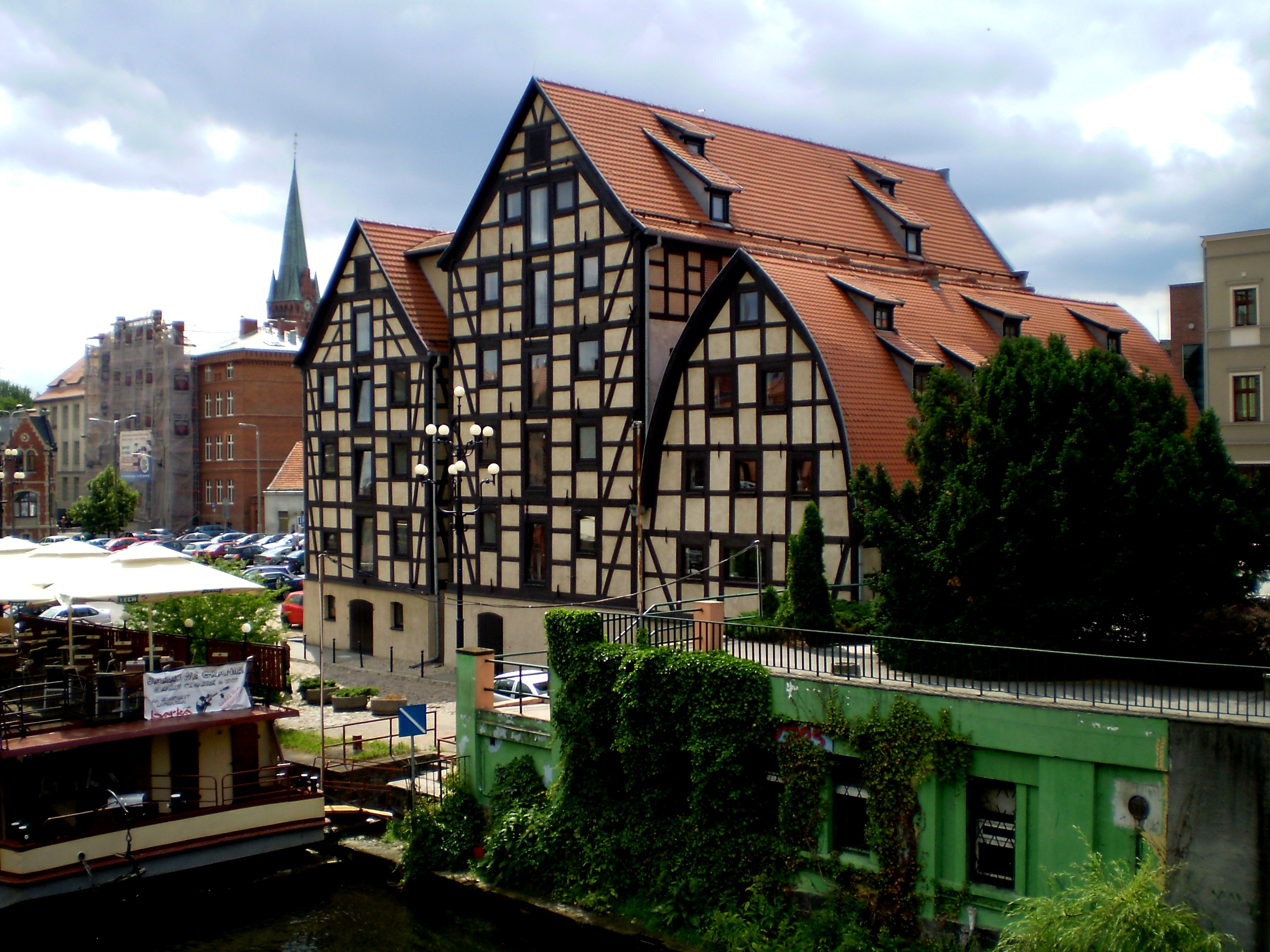 Stare spichrze szachulcowe nad Brdą, Bydgoszcz, ul. Grodzka